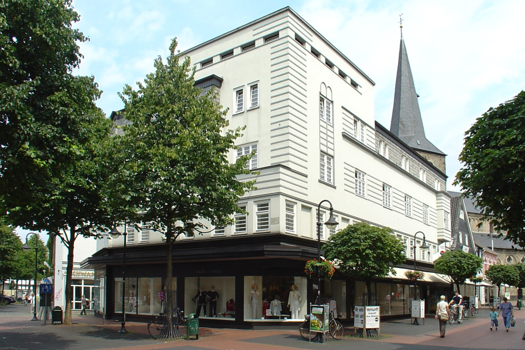 Wohn- und Geschäftshaus, Hilden, Mittelstraße 72/74 This is a photograph of an architectural monument.